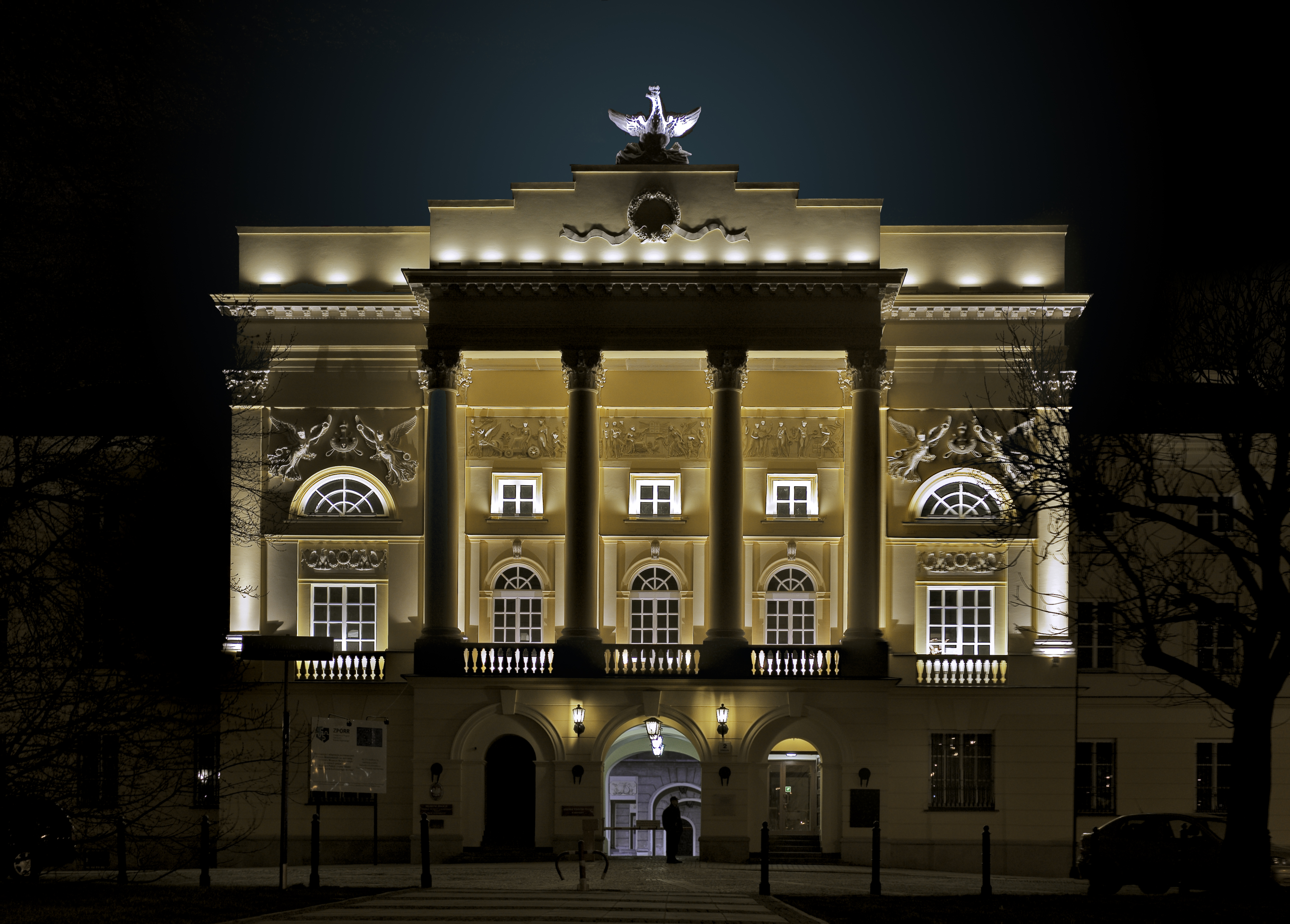 pałac Mostowskich, poł. XVIII, 1823, 1949